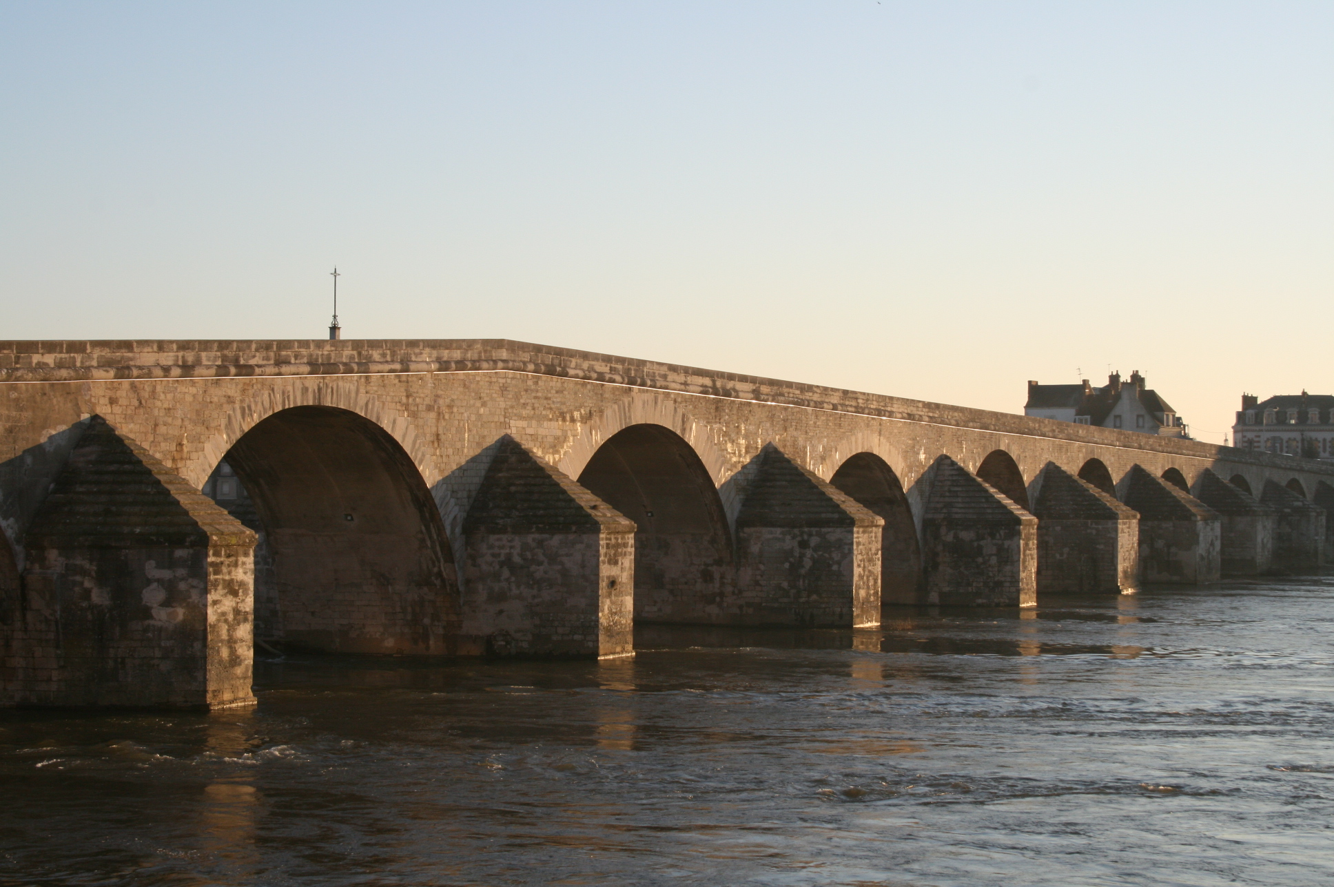 Vieux pont de Gien (Loiret - France)